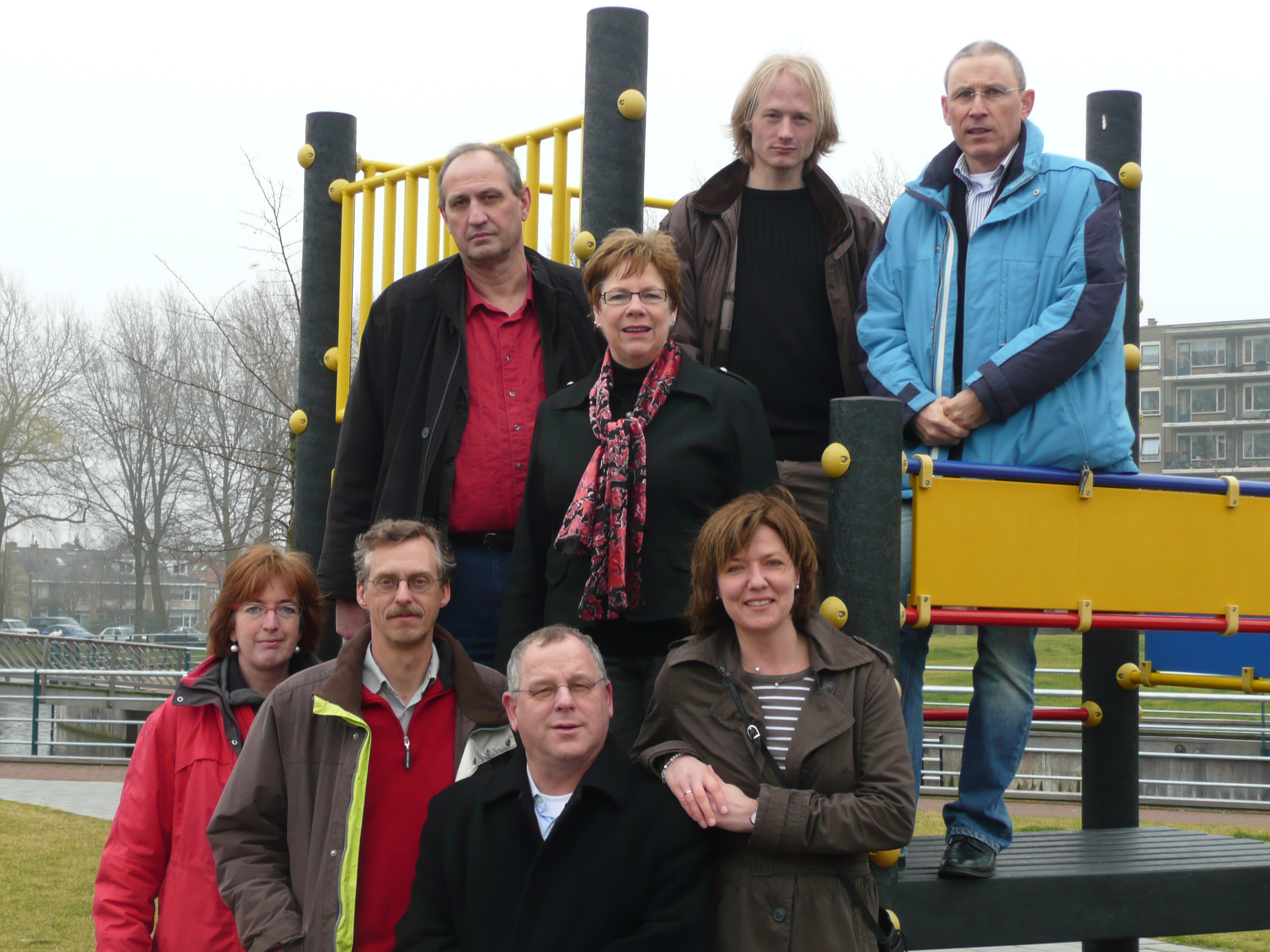 Wethouder, fractie en steunfractie